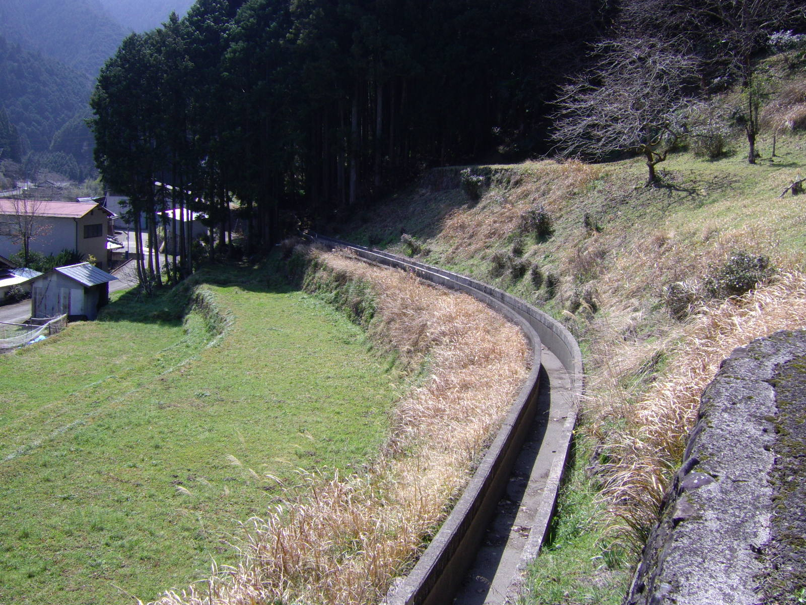 重要文化的景観「蘭島および三田・清水の農山村景観」－上湯用水